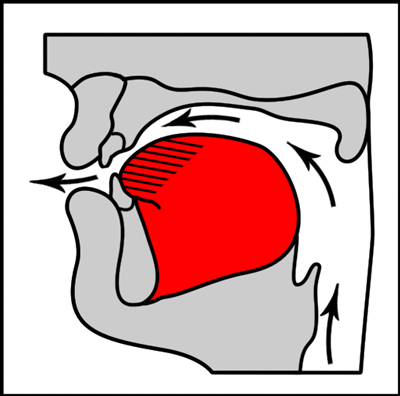 Артикуляция гласного ě (верхнелужицкий язык). Источник: Šewc-Schuster H. Gramatika hornjoserbskeje rěče. — Budyšin: Domowina, 1984. — Т. 1